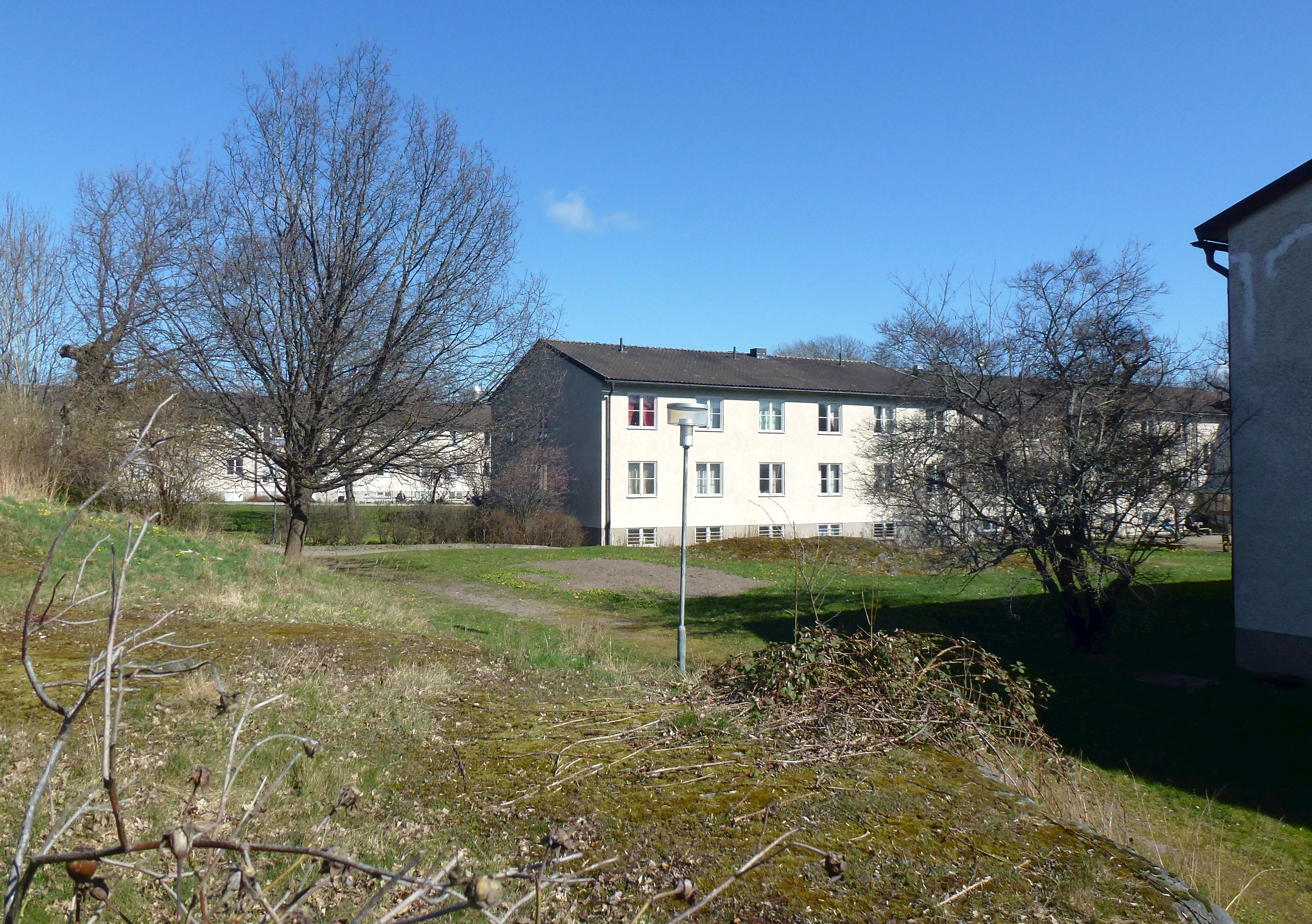 Skarpnäcksgårdens vårdhem